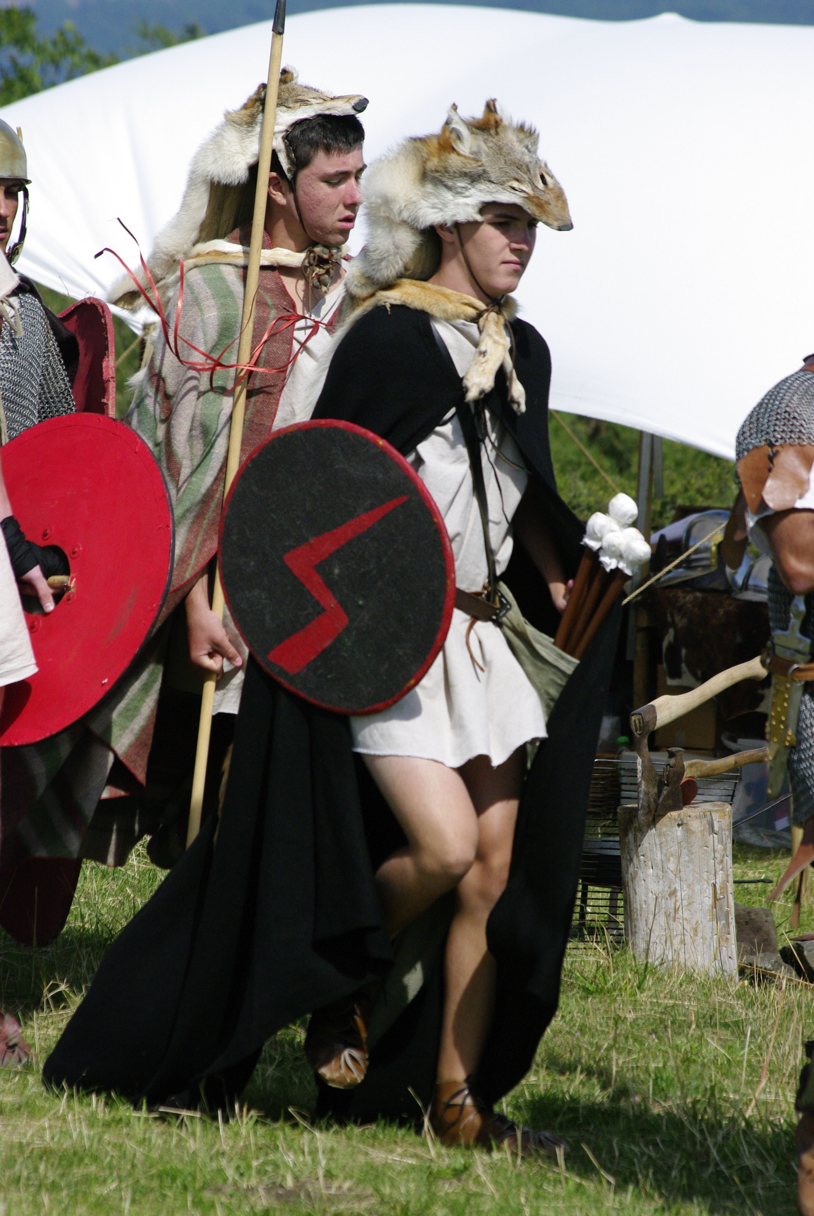 Deux vélites d'un groupe de reconstitution de l'armée romaine républicaine. Photographie réalisée le 22 juillet 2012 sur le plateau de Gergovie lors des Arverniales.